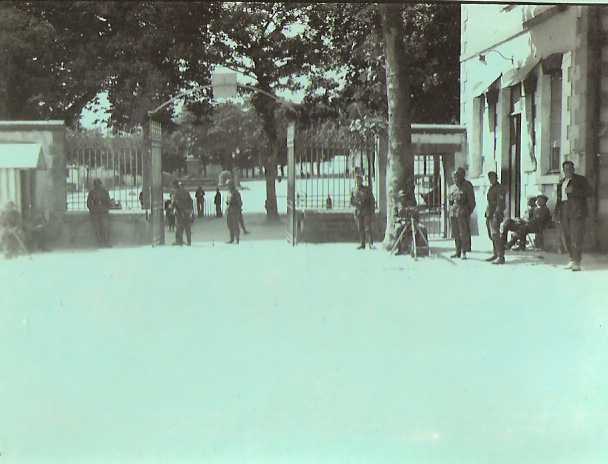 entrée du camp stalag 135 QUIMPER